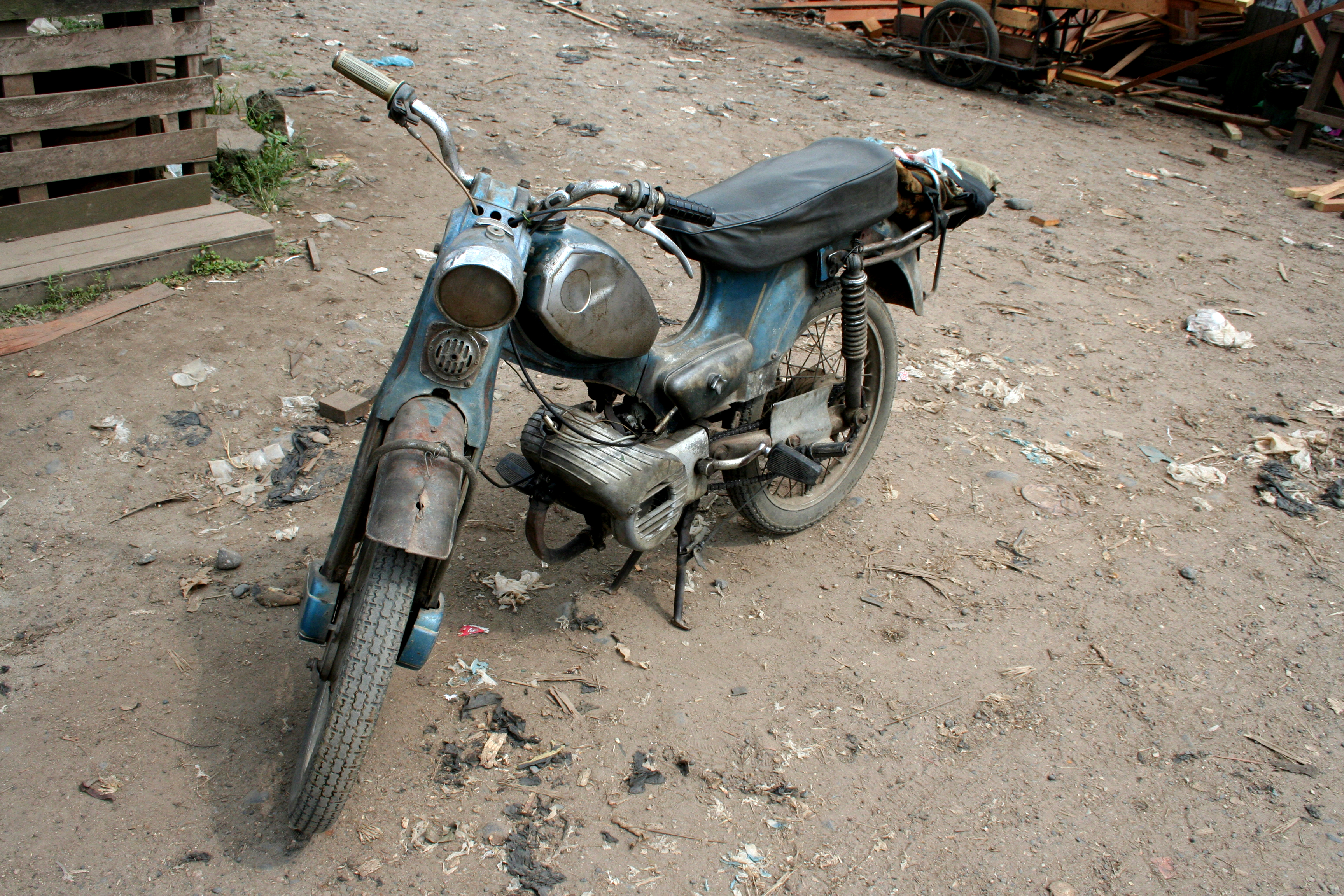 Une moto de collection : LA ZUNDAPP This is an image with the theme "Africa on the Move or Transport" from: Cameroon